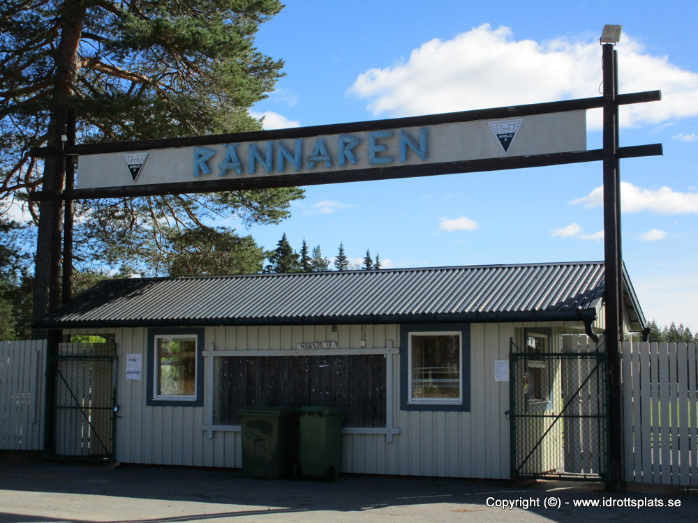 Idrottsplatsen Rännaren, hemmaplan för Norsjö IF